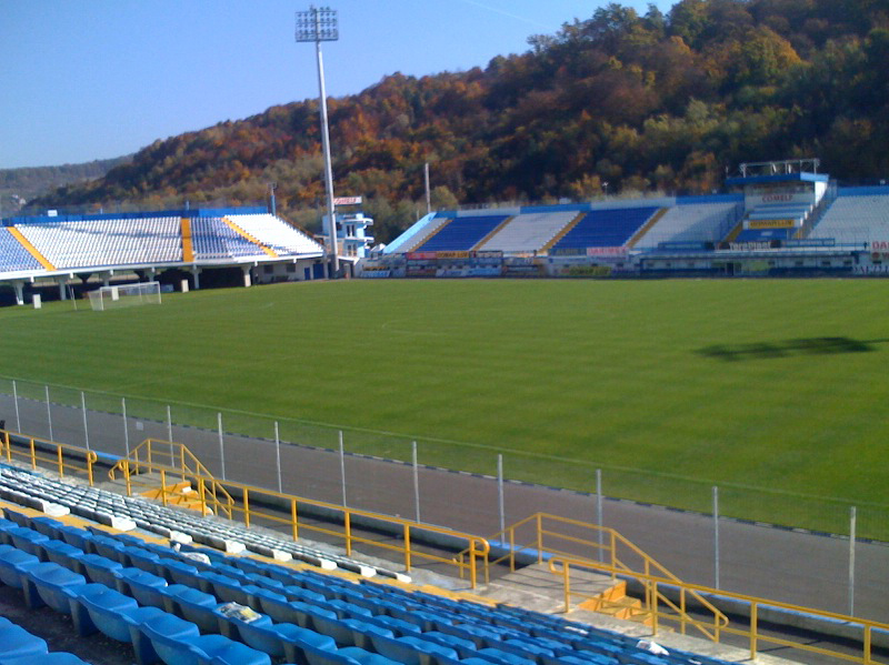 Stadion Gloria Bistrița